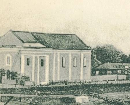 Беларуская (тарашкевіца): Магілёў (Mahiloŭ), Школішча (Školišča). Касьцёл Сьвятога Антонія Падуанскага і кляштар бэрнардынаў